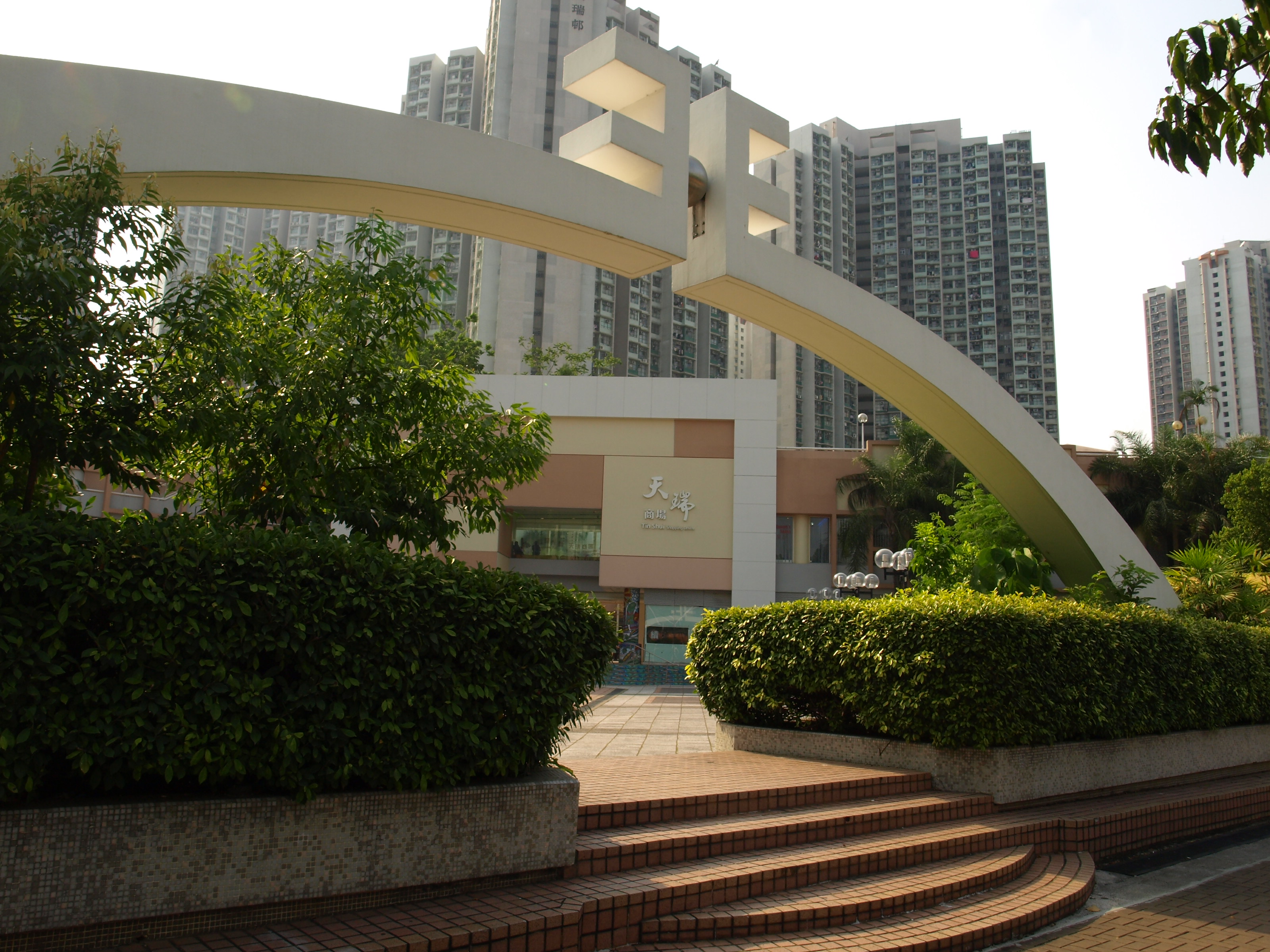 中文（香港）: 天瑞邨前的「天」字拱門裝飾